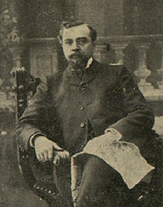 Харитон Генадиев.